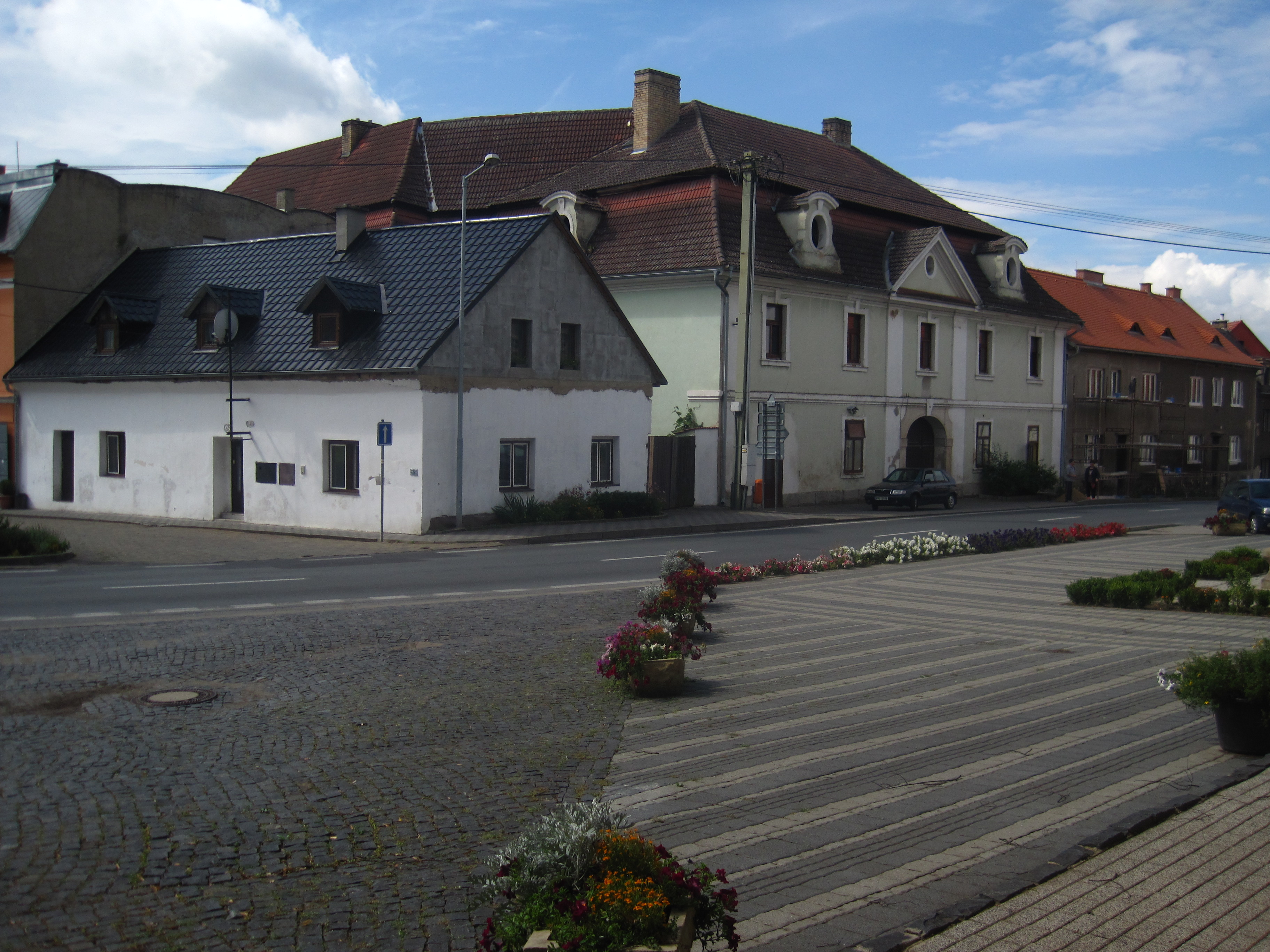 Barokní dům čp. 66, Liběšice 66, Liběšice (okres Litoměřice).